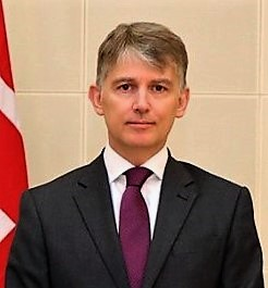 Präsident Francisco Guterres nimmt die Akkreditierung der neuen Botschafter in Osttimor entgegen: Finnland: Jari Sinkari Vereinigtes Königreich: Owen John Jenkins Polen: Beata Stoczynski Tetun: Prezidente Repúblika Francisco Guterres Lú Olo, ohin, simu karta kredensiál husi Embaixadór Finlandia, Jari Sinkari, Embaixadór Reinu Unidu, Owen John Jenkins, no Embaixadora Polónia, Beata Stoczynski atu hametin liután kooperasaun no amizade ho Timor-Leste.